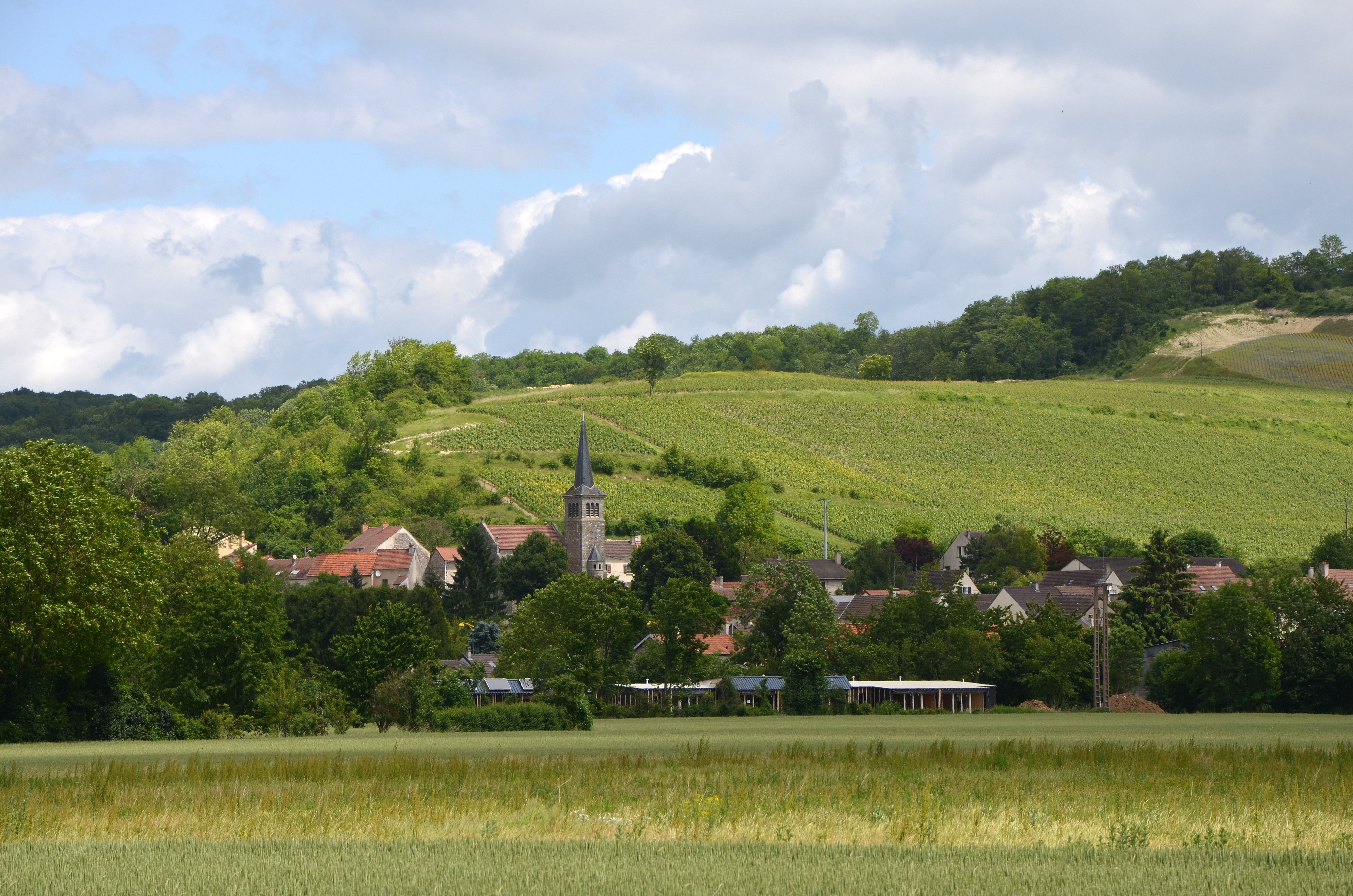 Brasles, Aisne, France